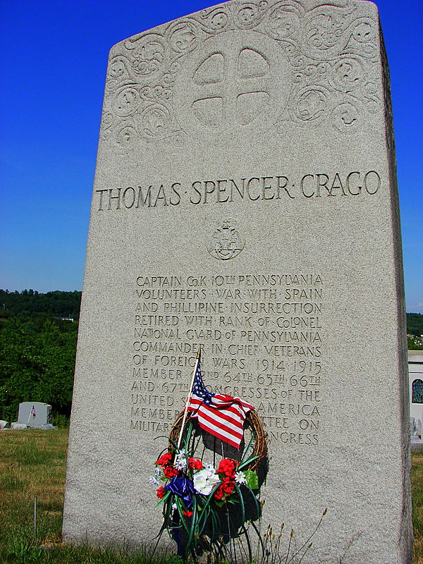 Patriot